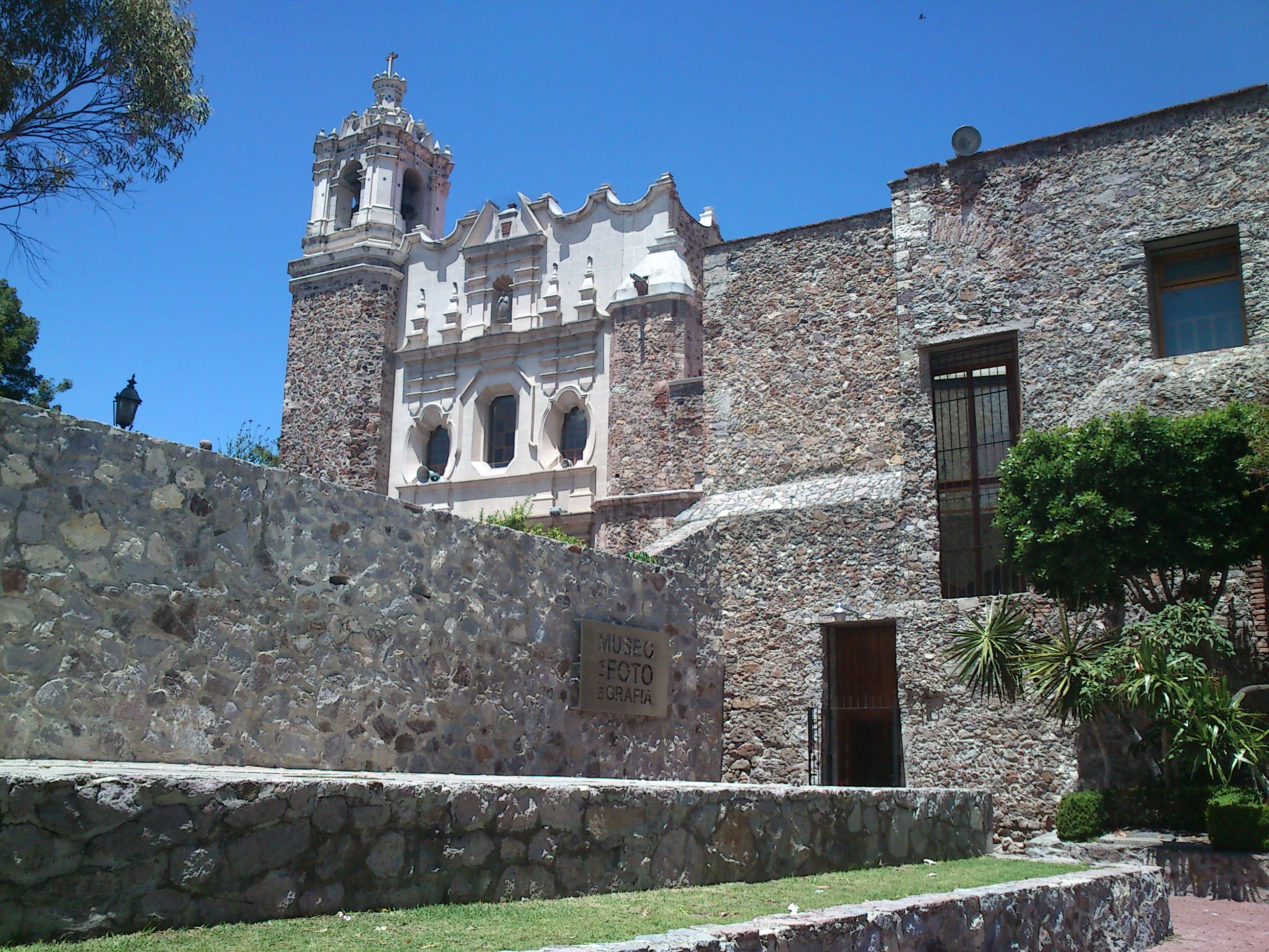 Templo franciscano, ubicado a un costado del museo de fotografía en la ciudad de Pachuca de Soto, Hidalgo.